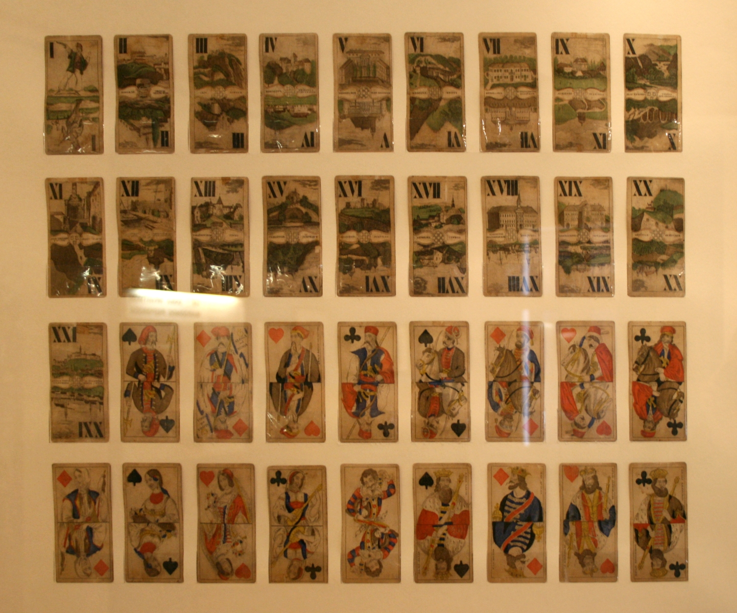 "Dvorane zagrebačke karte", Josip Bäck, Zagreb 1847./48. karte sa slikama narodnih nošnji i kostima s praizvedbe opere Ljuba i zloba, veduta hrvatskih povijesnih gradova i najznačajnijih zgrada u Zagrebu, dobile su ime po "Dvorani", tj. Narodnom domu, snimljeno u Muzeju grada Zagreba